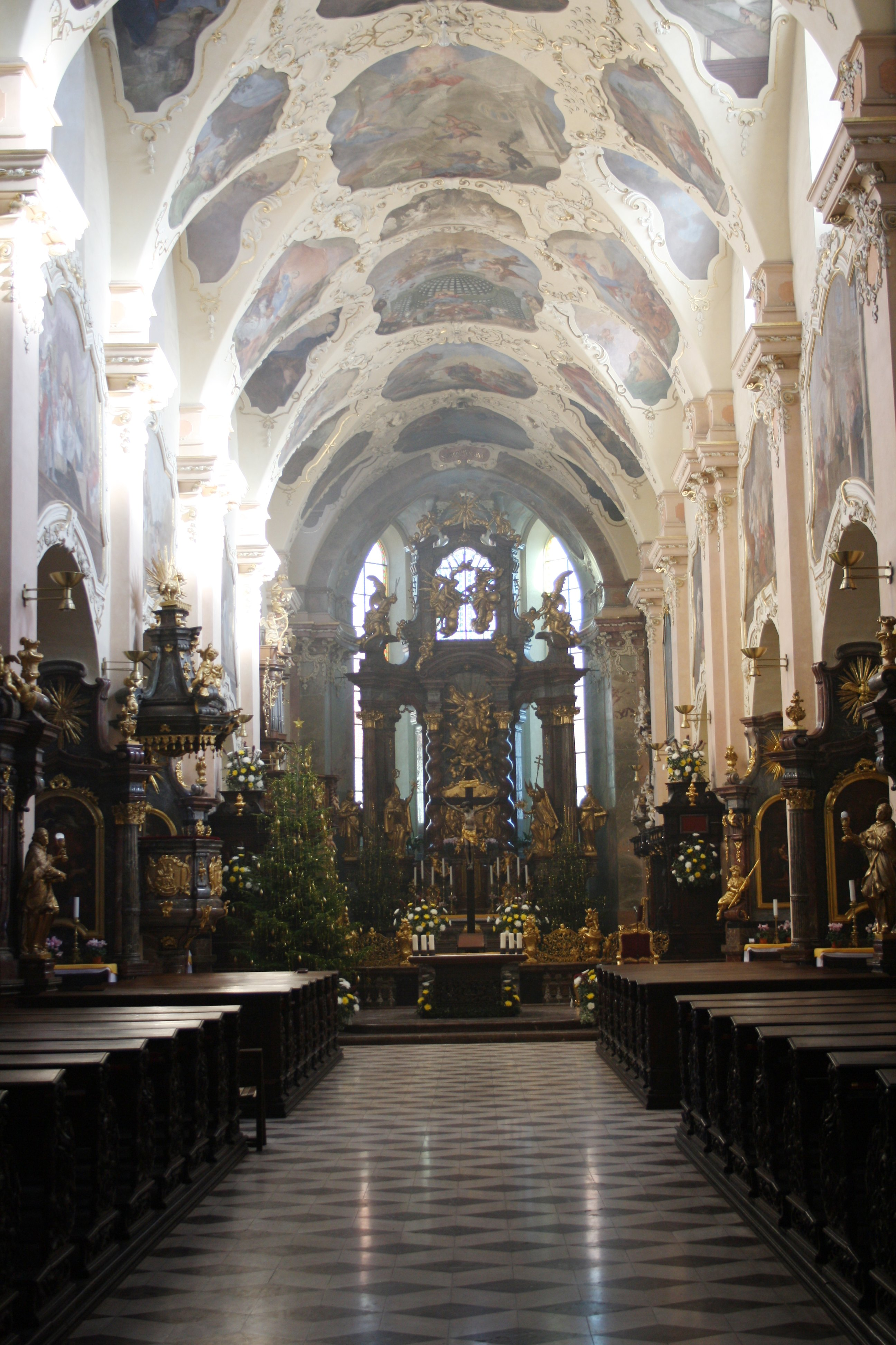 Bazilika Nanebevzetí Panny Marie na Strahově